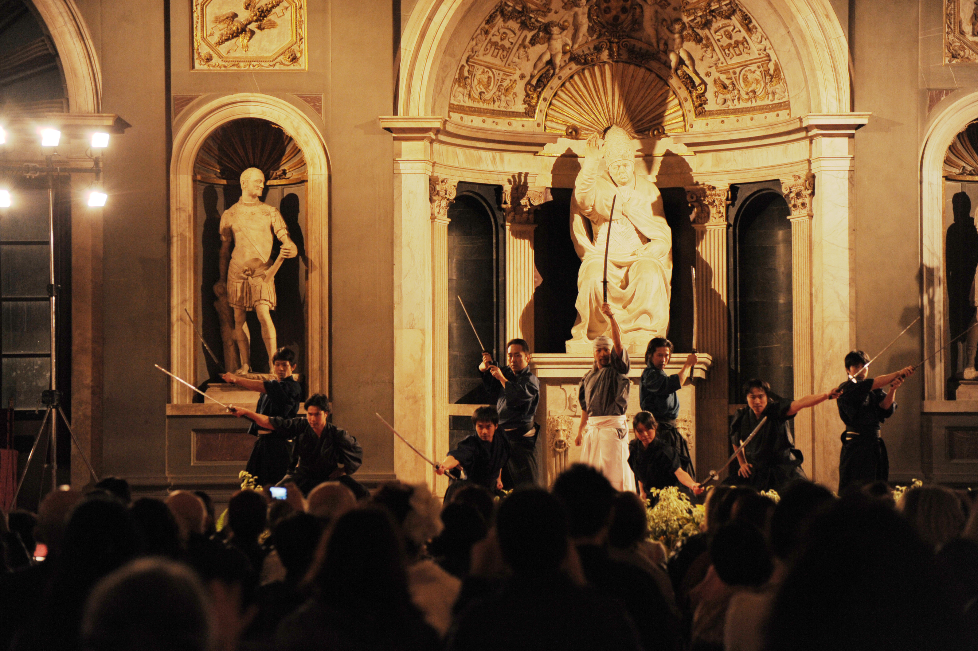 イタリア公演写真